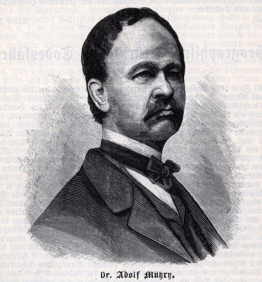 Portrait Adolf Mühry (ca. 1860er, Künstler unbekannt)